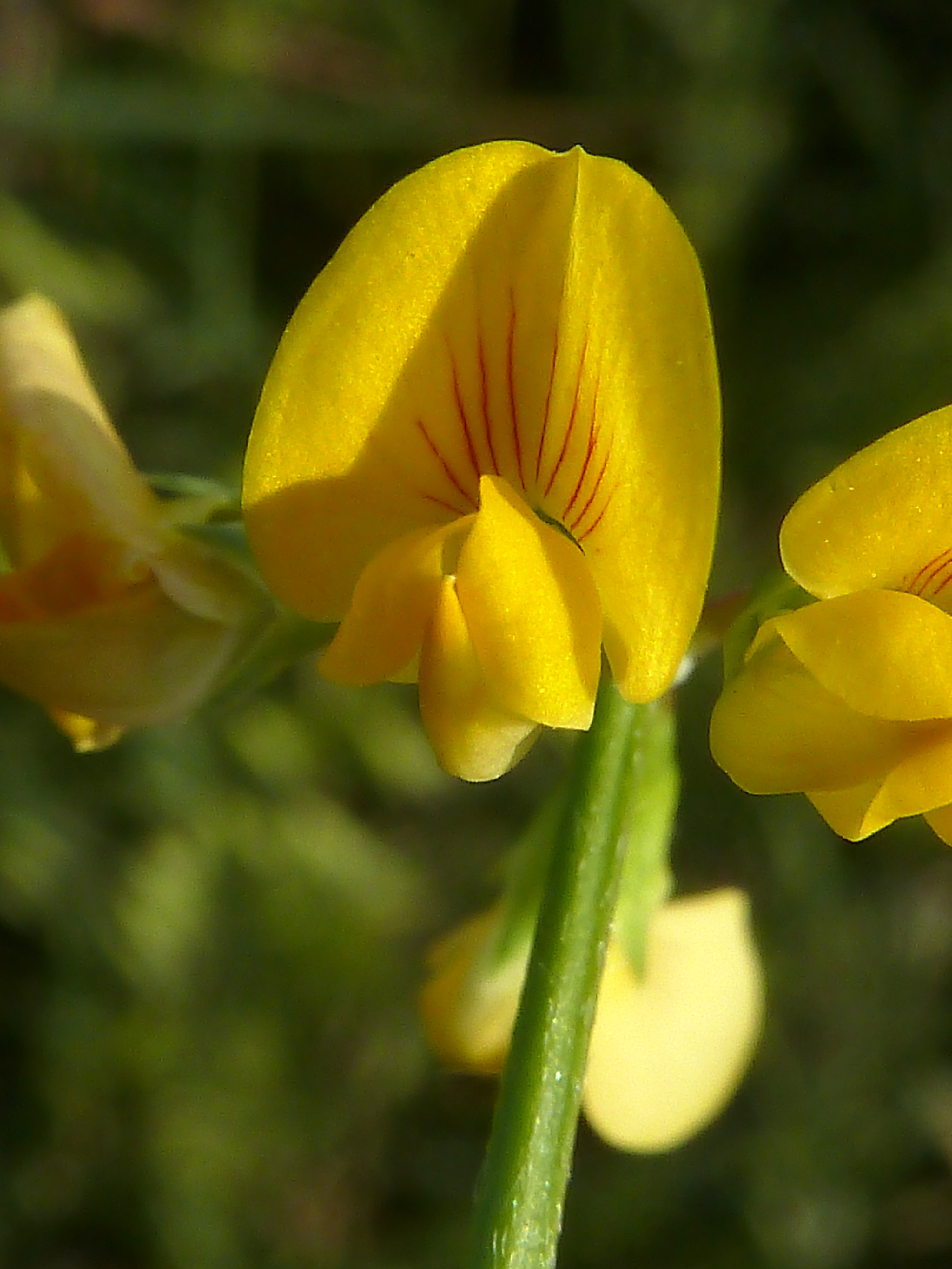 Scorpiurus muricatus (Granillo de oveja) - Flor, detalle. - Camino de la Azarbe de Patricio, Albatera, Provincia de Alicante (España).